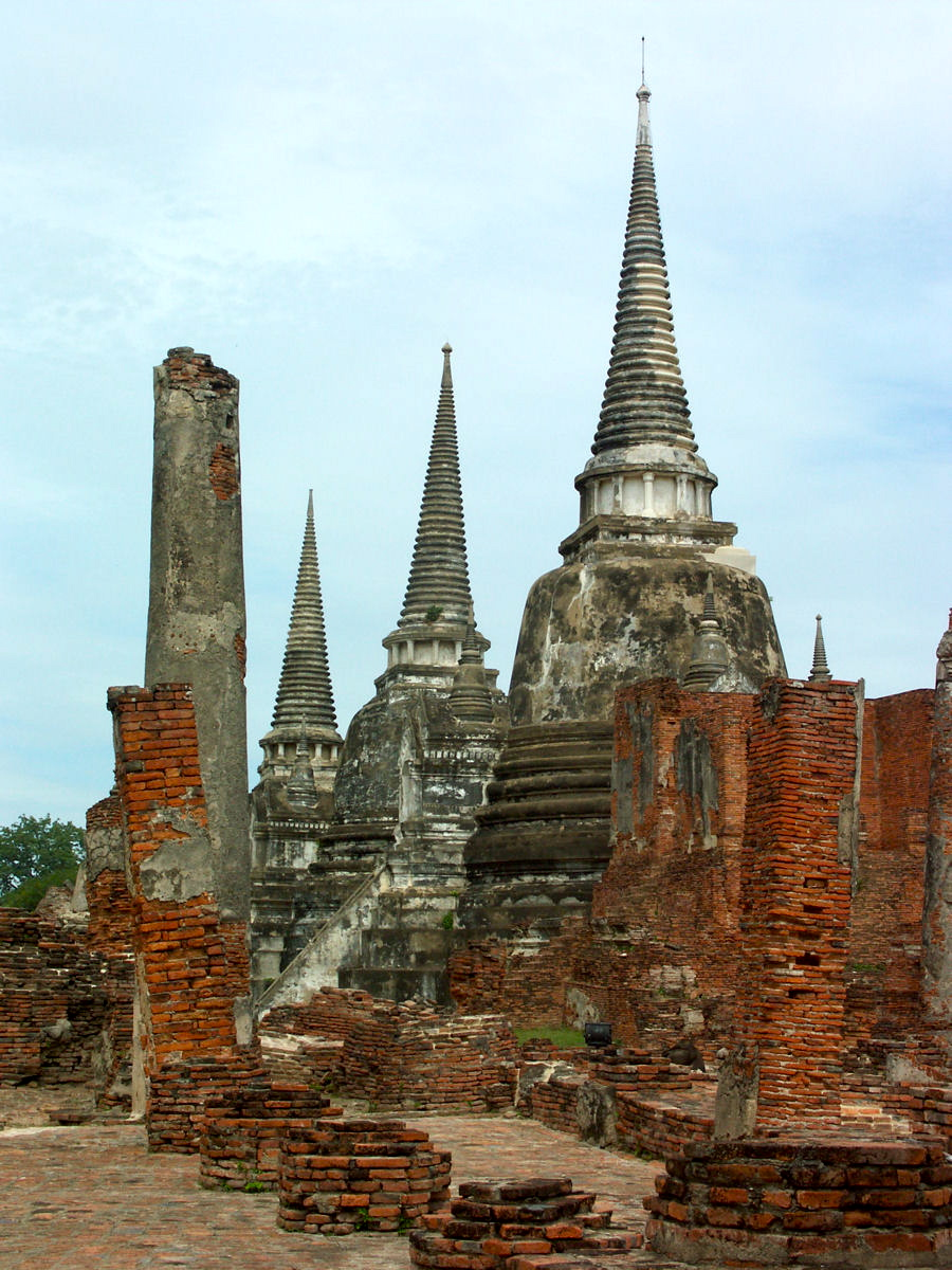 Wat Phra Si Sanphet (วัดพระศรีสรรเพชญ์), Ayutthaya, Thailand